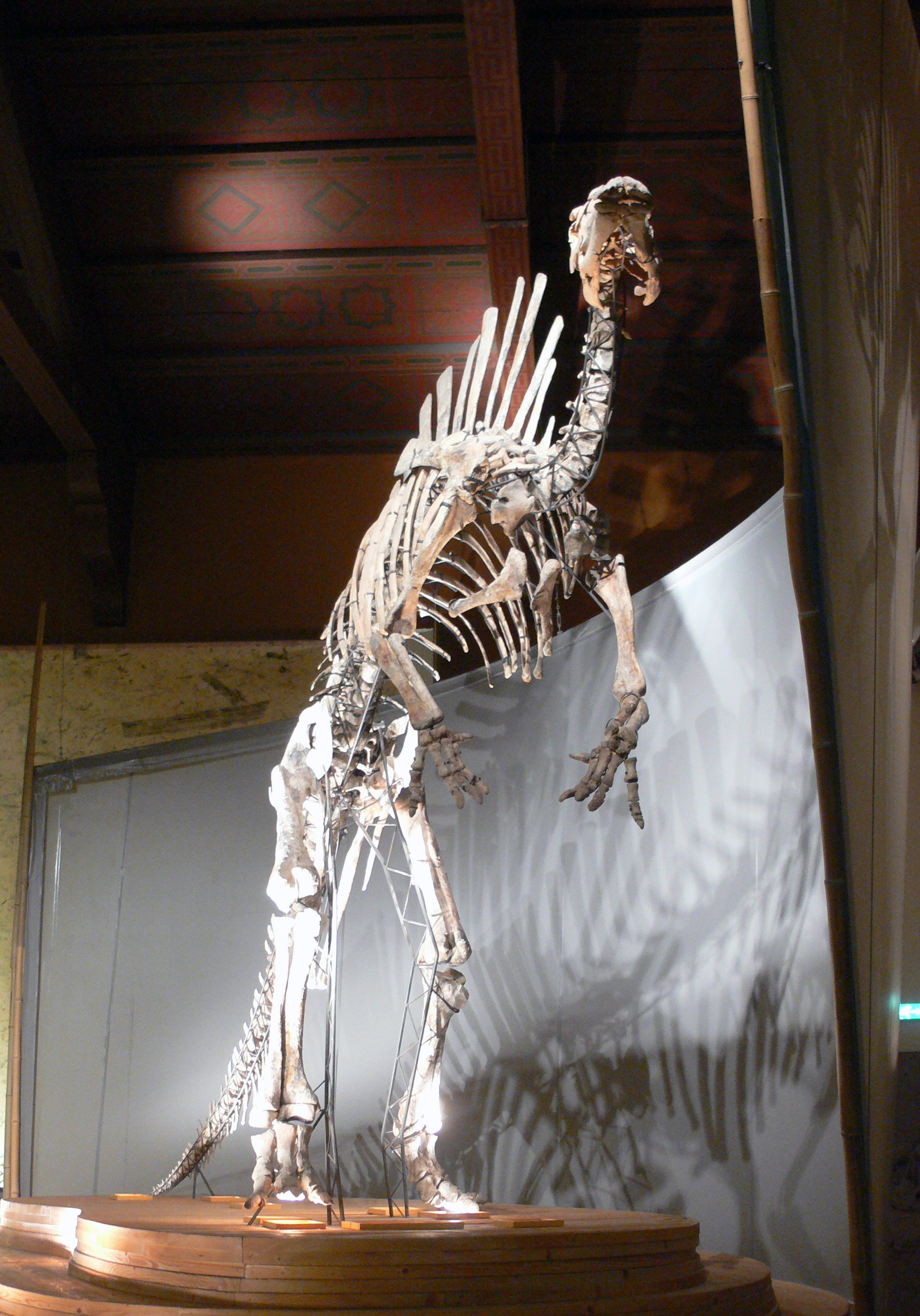 Ouranosaurus nigeriensis (Venise, museum d'histoire naturelle)